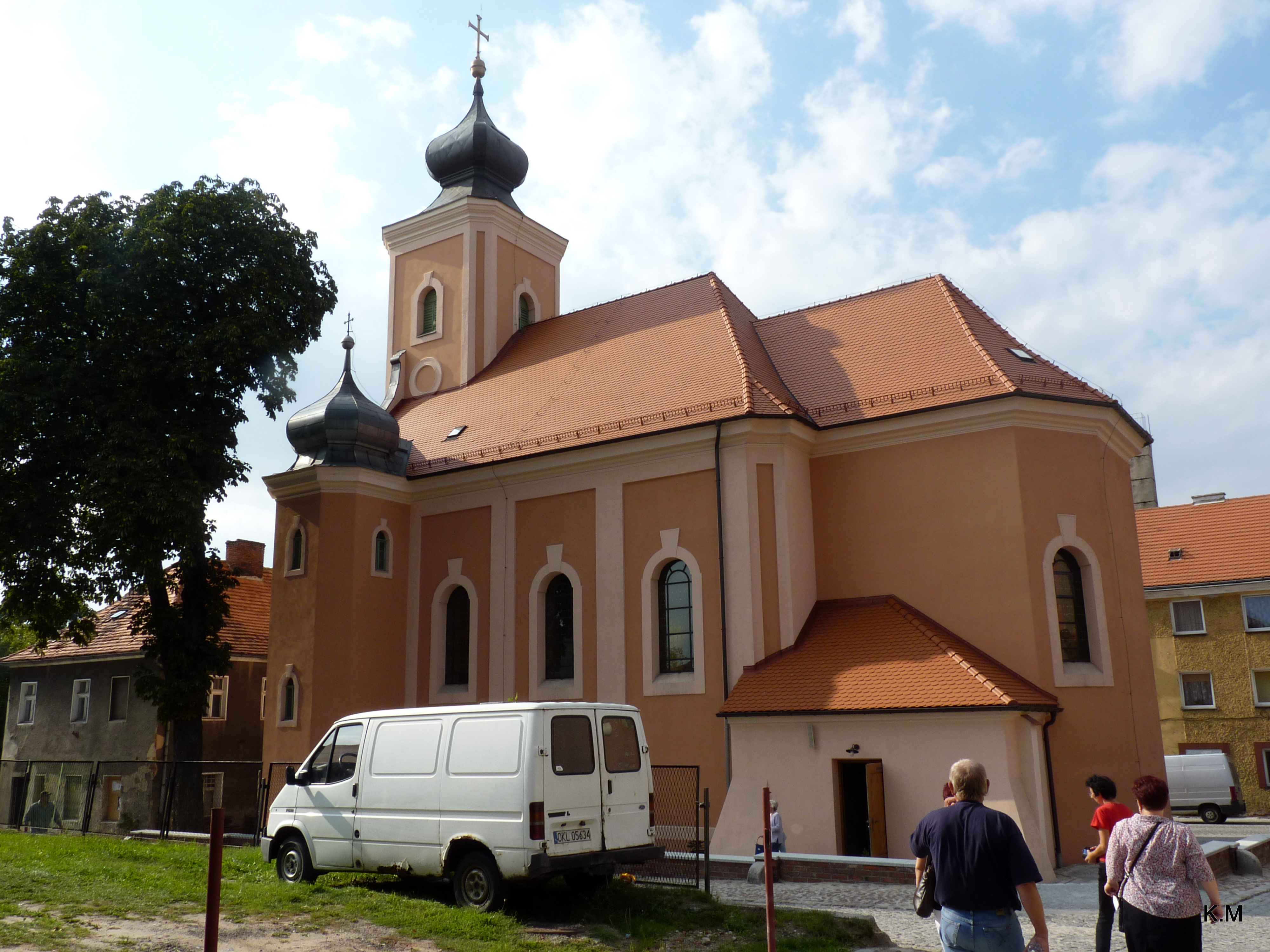 Byczyna - Kościól św Trójcy